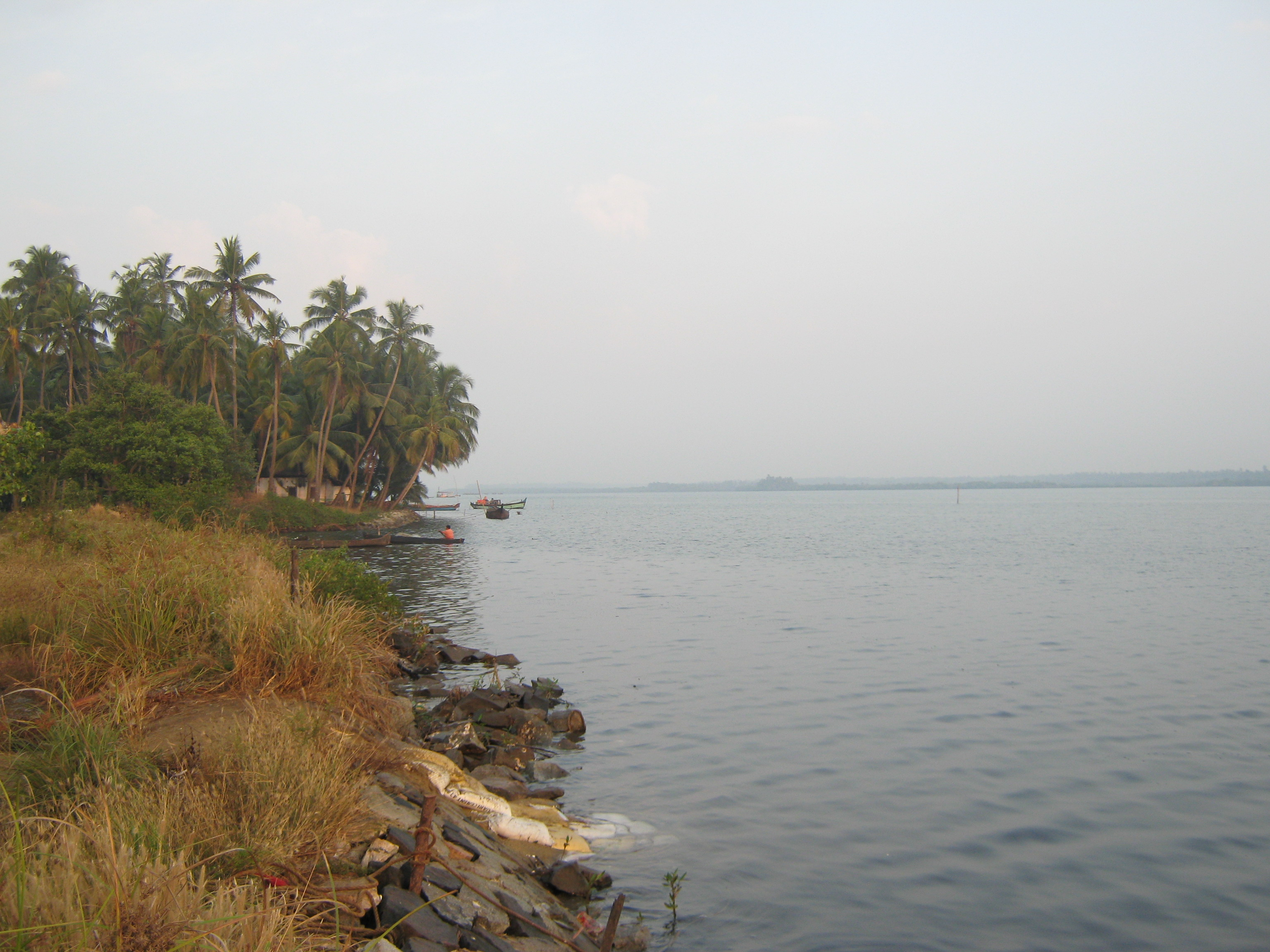 Valapattanam, Kannur, Kerala, India.